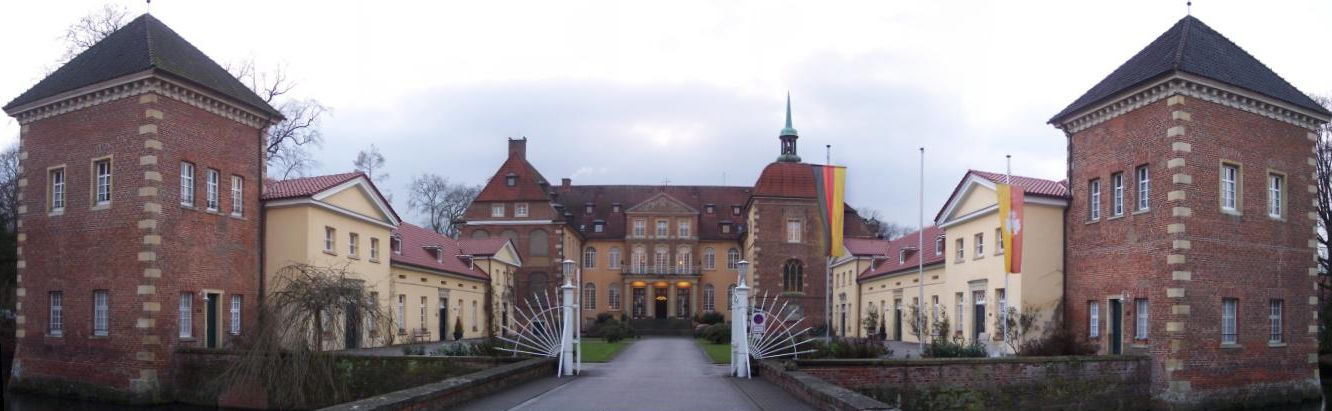 Schloss Velen